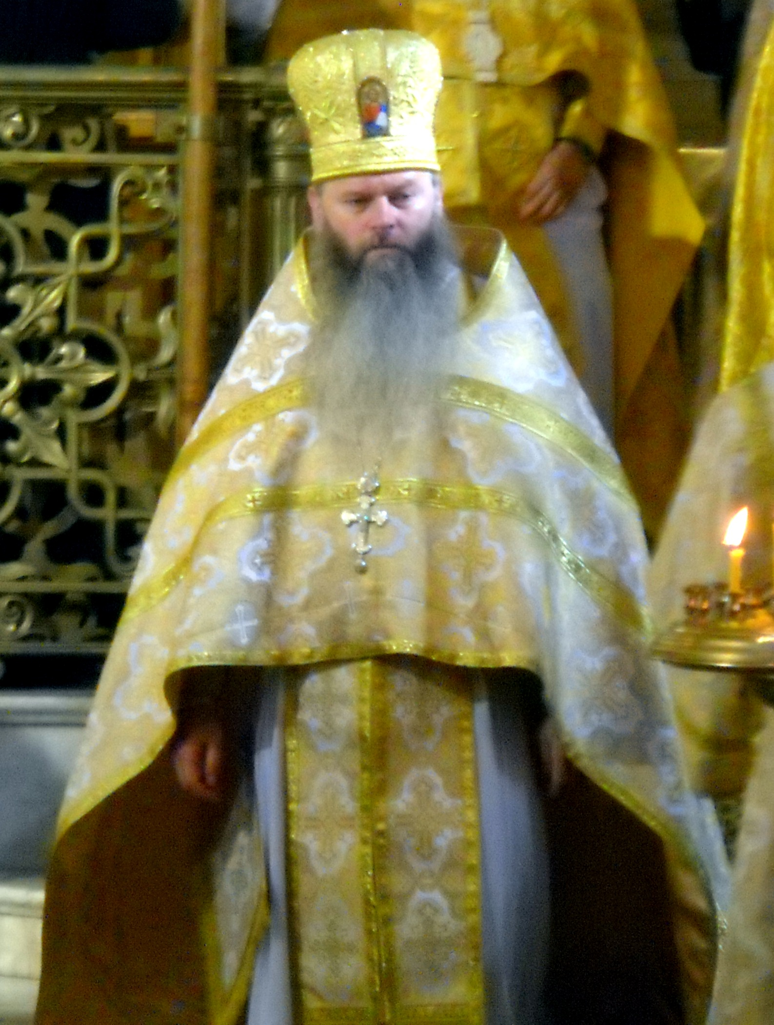 Archimandryta Atanazy (Nos), 12 października 2010